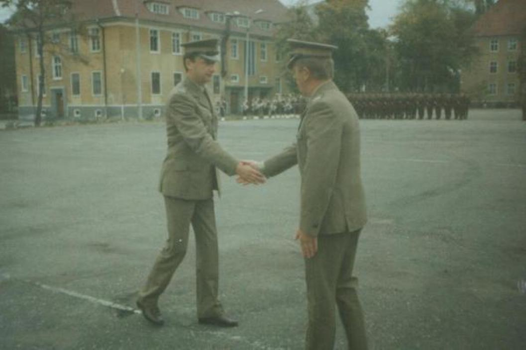 Garnizon Stargard Szczeciński, 1991 r. Dowódca mjr Piotr Szkurłat (po lewej)